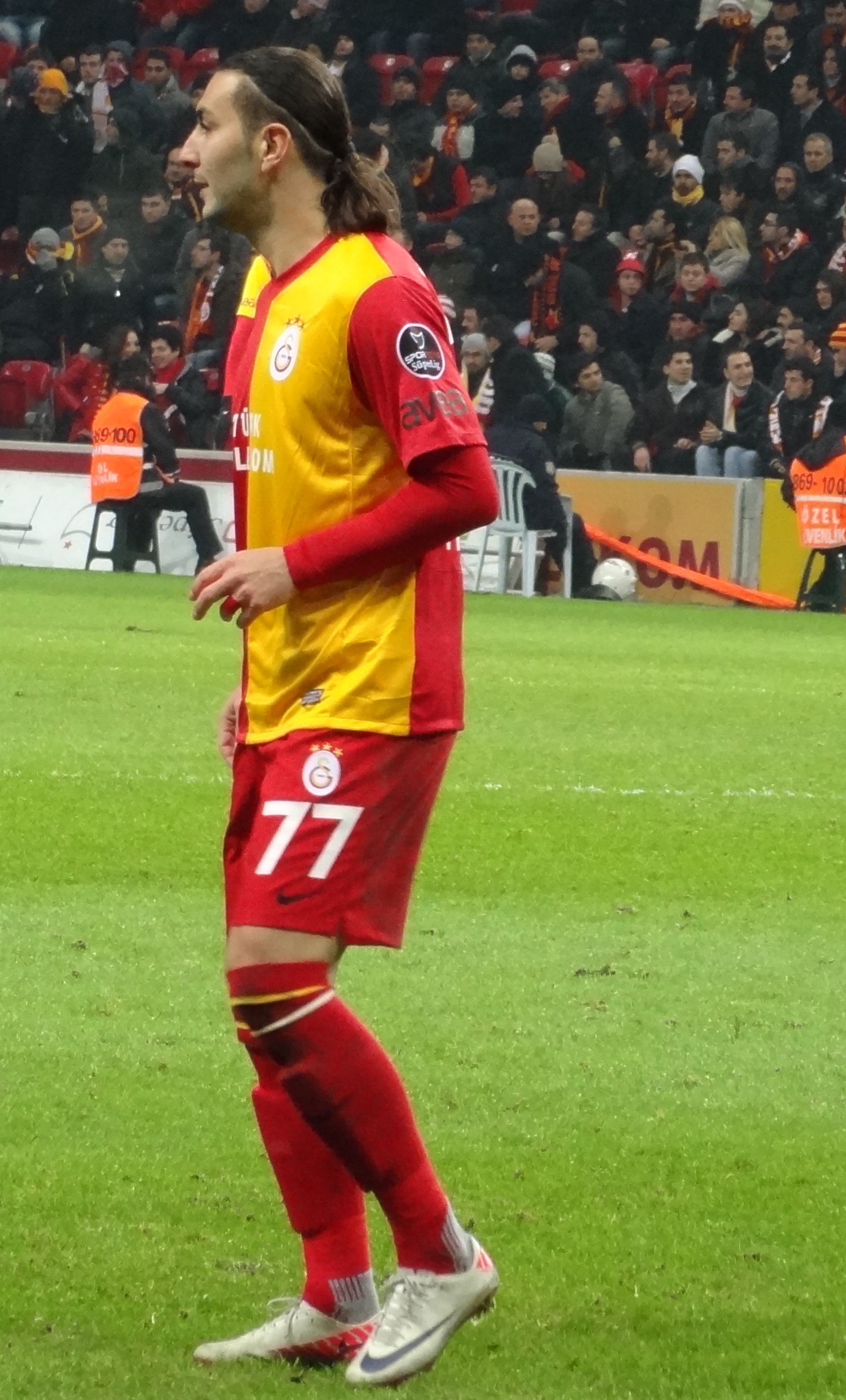 Necati Kayserispor maçında Galatasaray formasıyla Türk Telekom Arena'daki ilk maçı